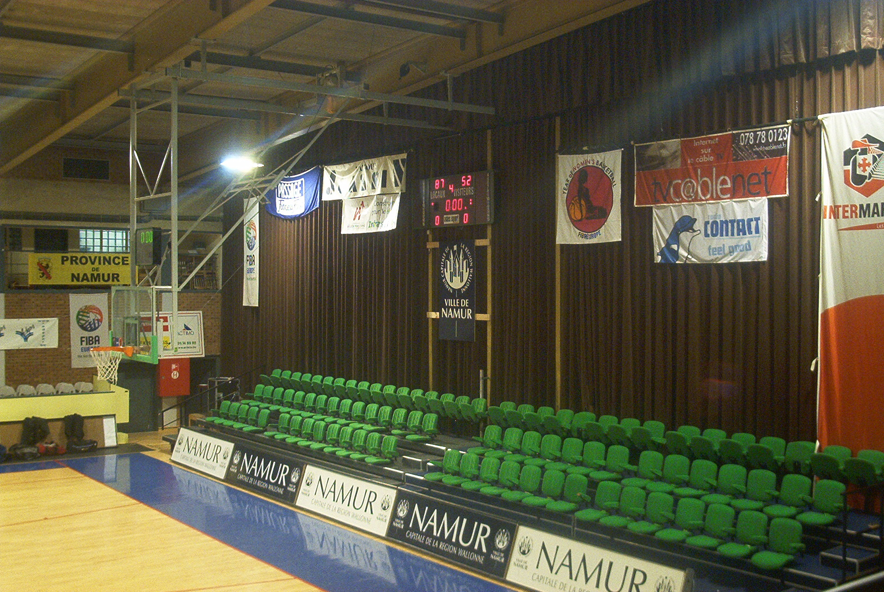 Vue depuis la tribune principale, après un match de l'UR Namur Basket.